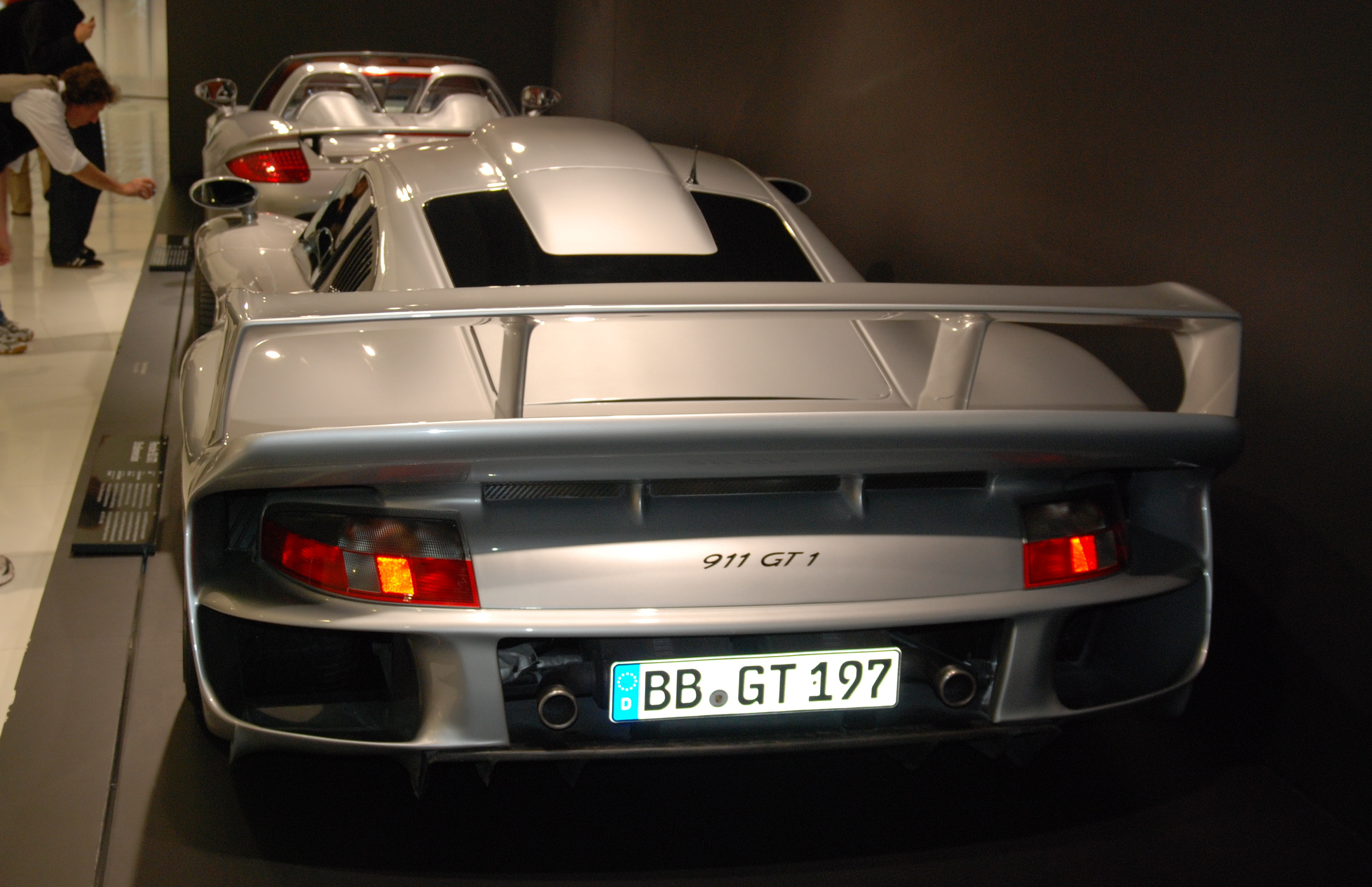 Porsche 911 GT1 Straßenversion im Porsche Museum Native namePorsche-MuseumLocationStuttgartCoordinates48° 50′ 07″ N, 9° 09′ 06″ E Established1976 (old museum) 2009 (new museum)Web page control : Q328623 VIAF: 138511768 GND: 2087859-X SUDOC: 155641123 NKC: ko2015876799 institution QS:P195,Q328623